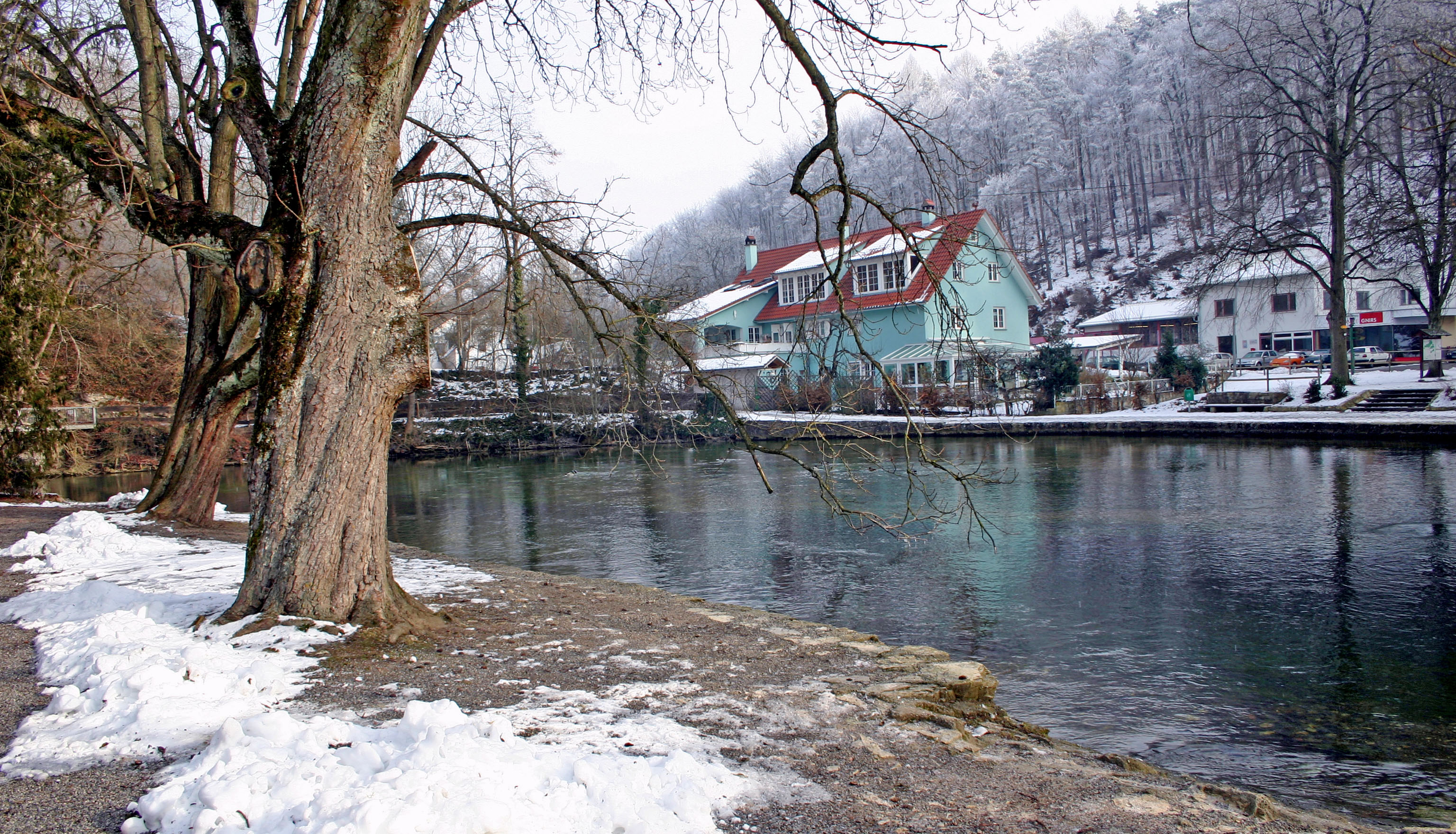 Radolfzeller Aach Quell.